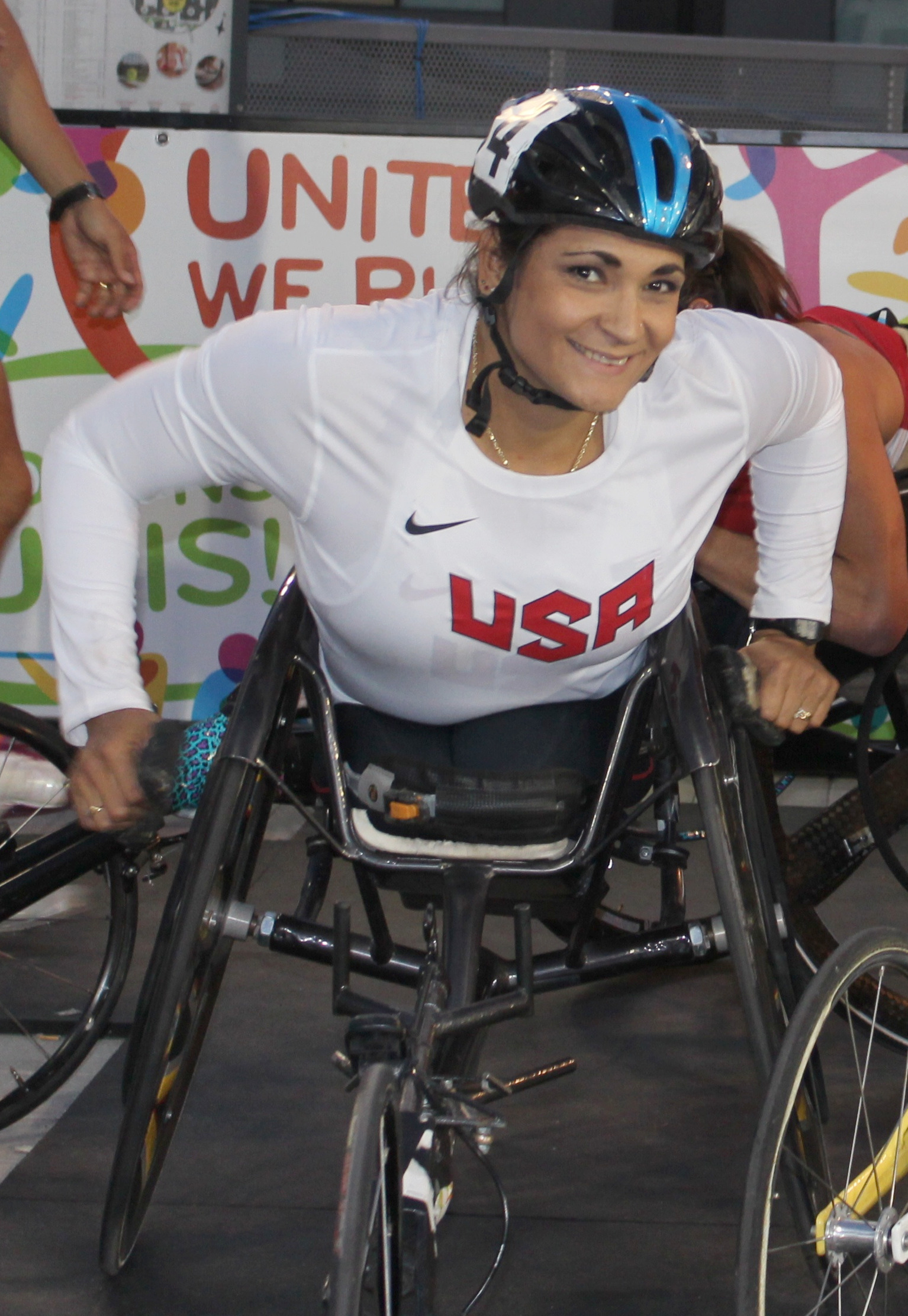 Cheri Madsen